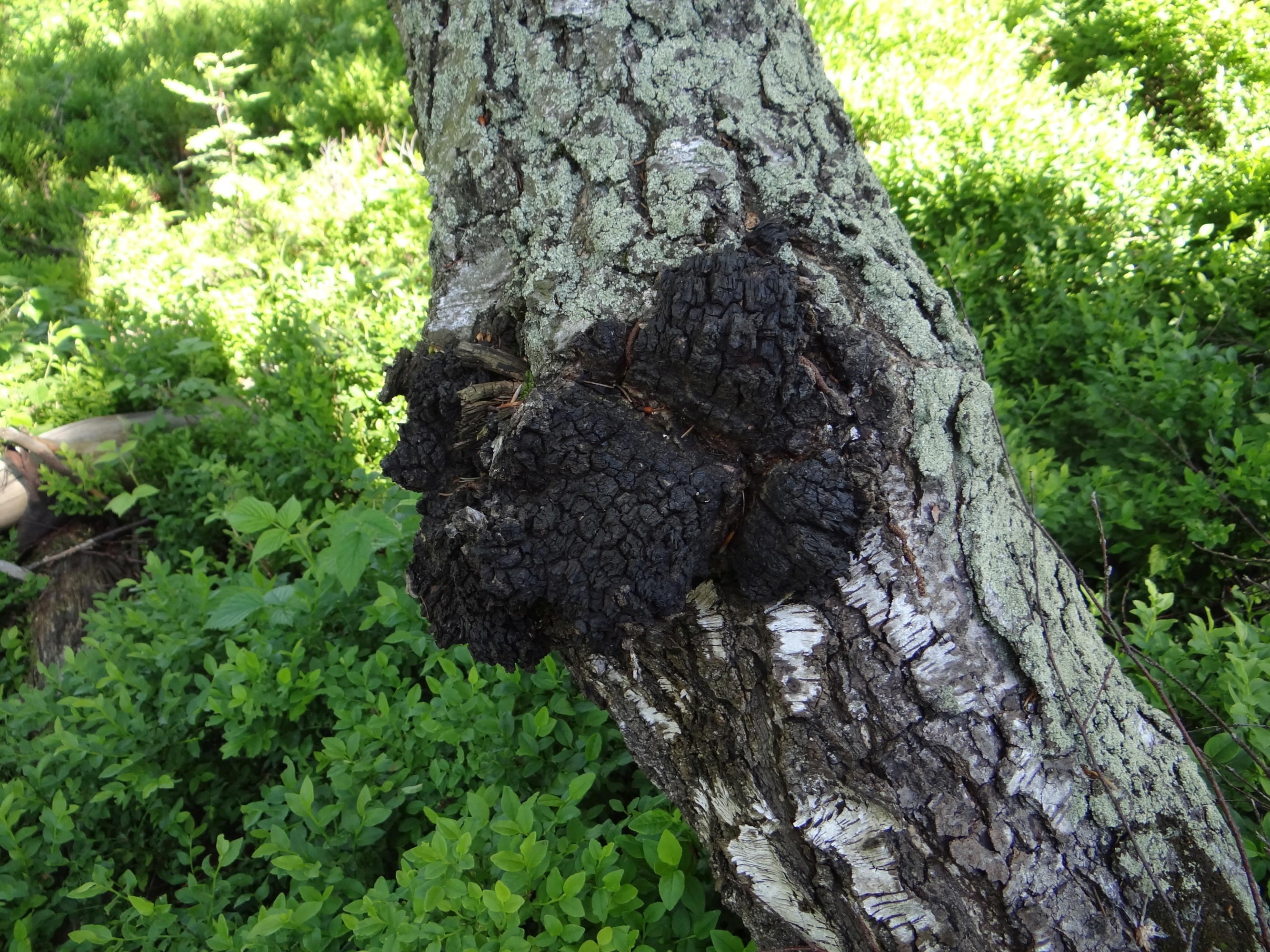 Inonotus obliquus (location: Poland, Beskid Mały, Magurka Wilkowicka)